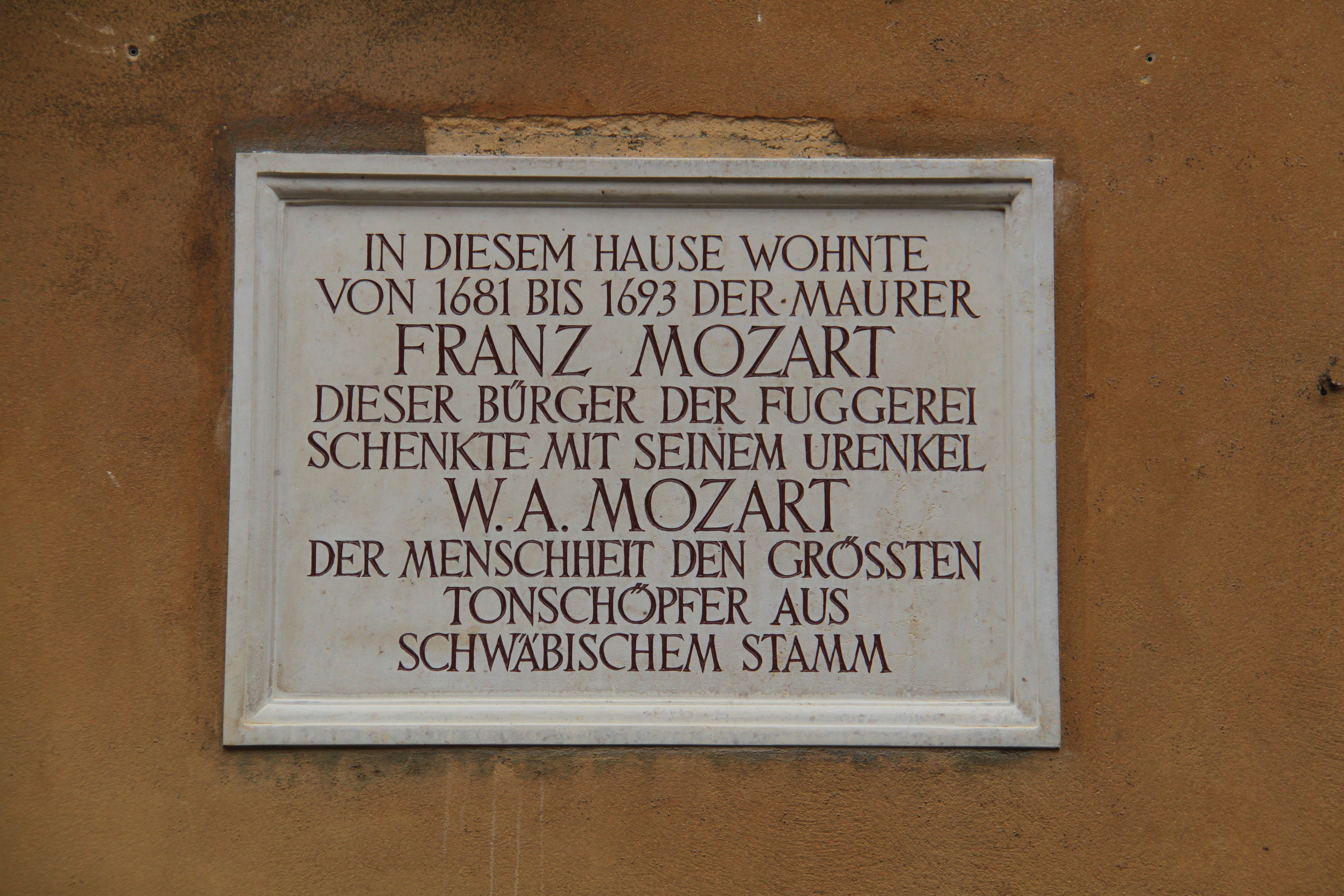 Impressionen Augsburg